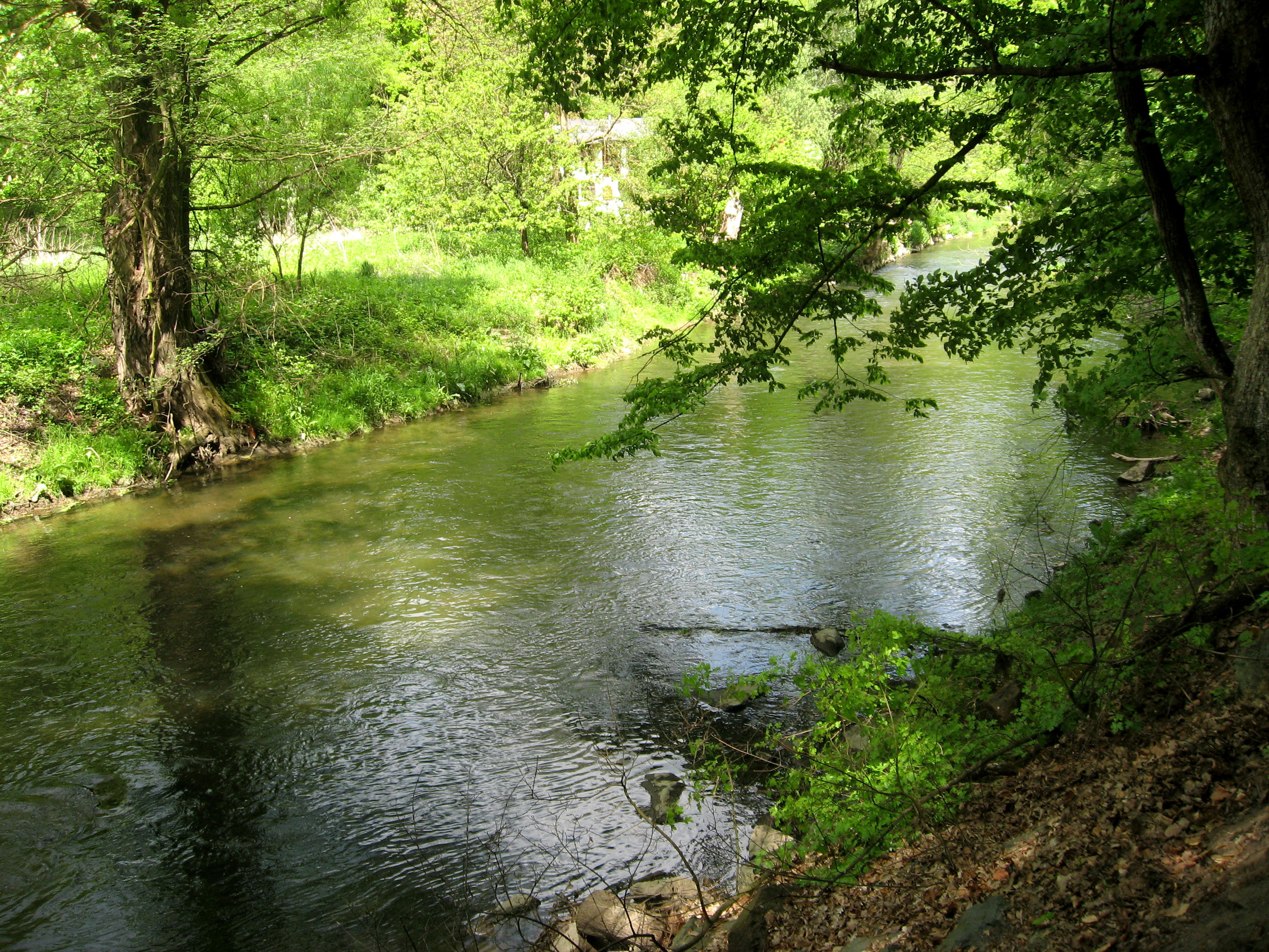 Svitava mezi Bílovicema nad Svitavou a Brnem